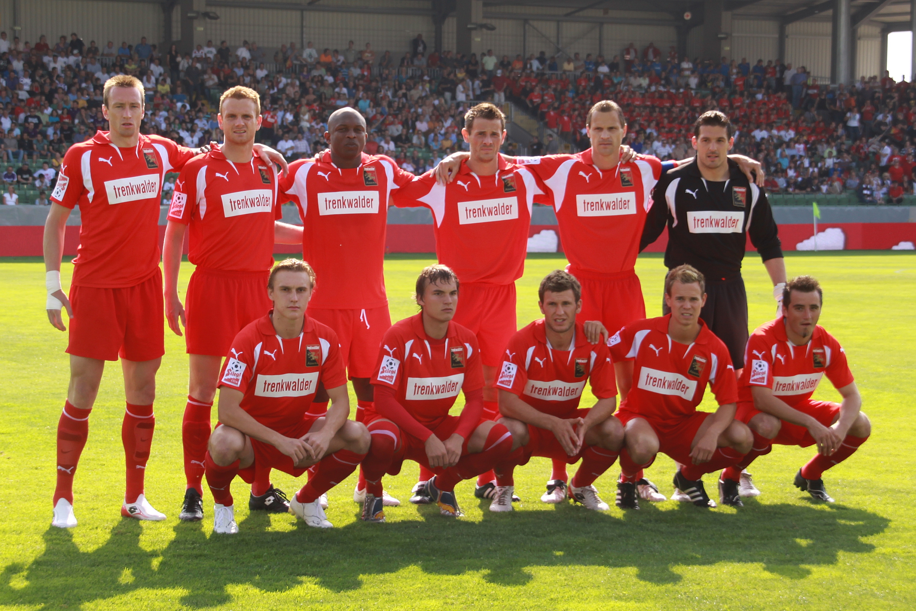 Finale im Österreichischer Fußball-Cup 2008/09 - Mannschaftsbild des Cupfinalisten FC Admira Wacker Mödling